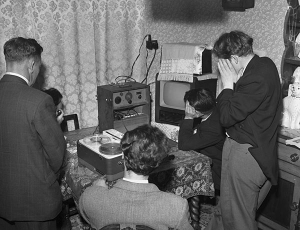 Teitl Cymraeg/Welsh title: Plaid Cymru'n darlledu "Radio Wales" yn anghyfreithlon am y tro cyntaf yn y Gogledd Ffotograffydd/Photographer: Geoff Charles (1909-2002) Nodyn/Note: An image of members of Plaid Cymru gathered around a transmitter with their faces hidden as they broadcasted "Radio Wales" illegally for the first time in North Wales Dyddiad/Date: August 6, 1959 Cyfrwng/Medium: Negydd ffilm / Film negative Cyfeiriad/Reference: (gch20779) Rhif cofnod / Record no.: 3470353 Rhagor o wybodaeth am gasgliad Geoff Charles yn Llyfrgell Genedlaethol Cymru More information about the Geoff Charles Collection at the National Library of Wales